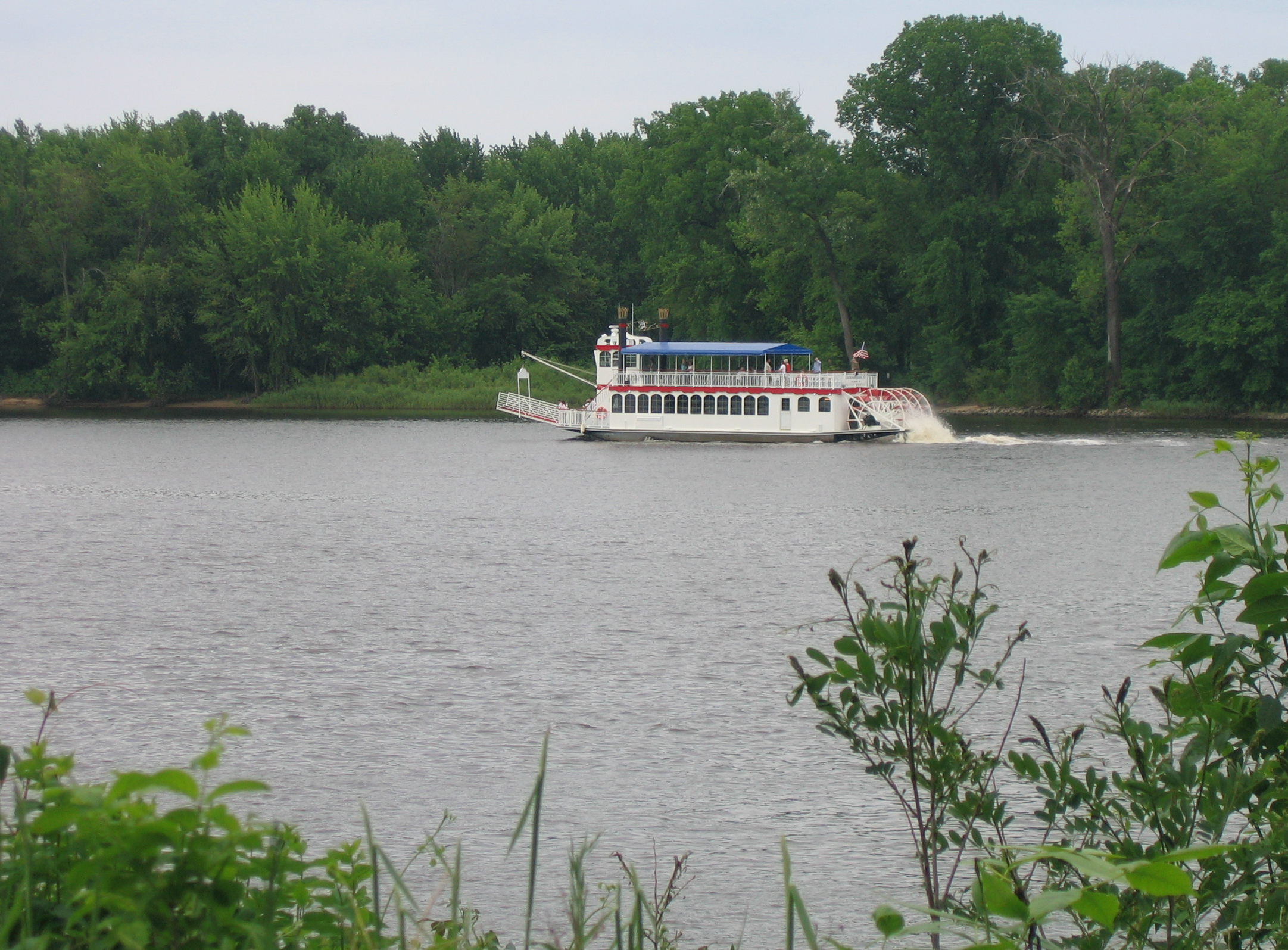 A Mississipi riverboat